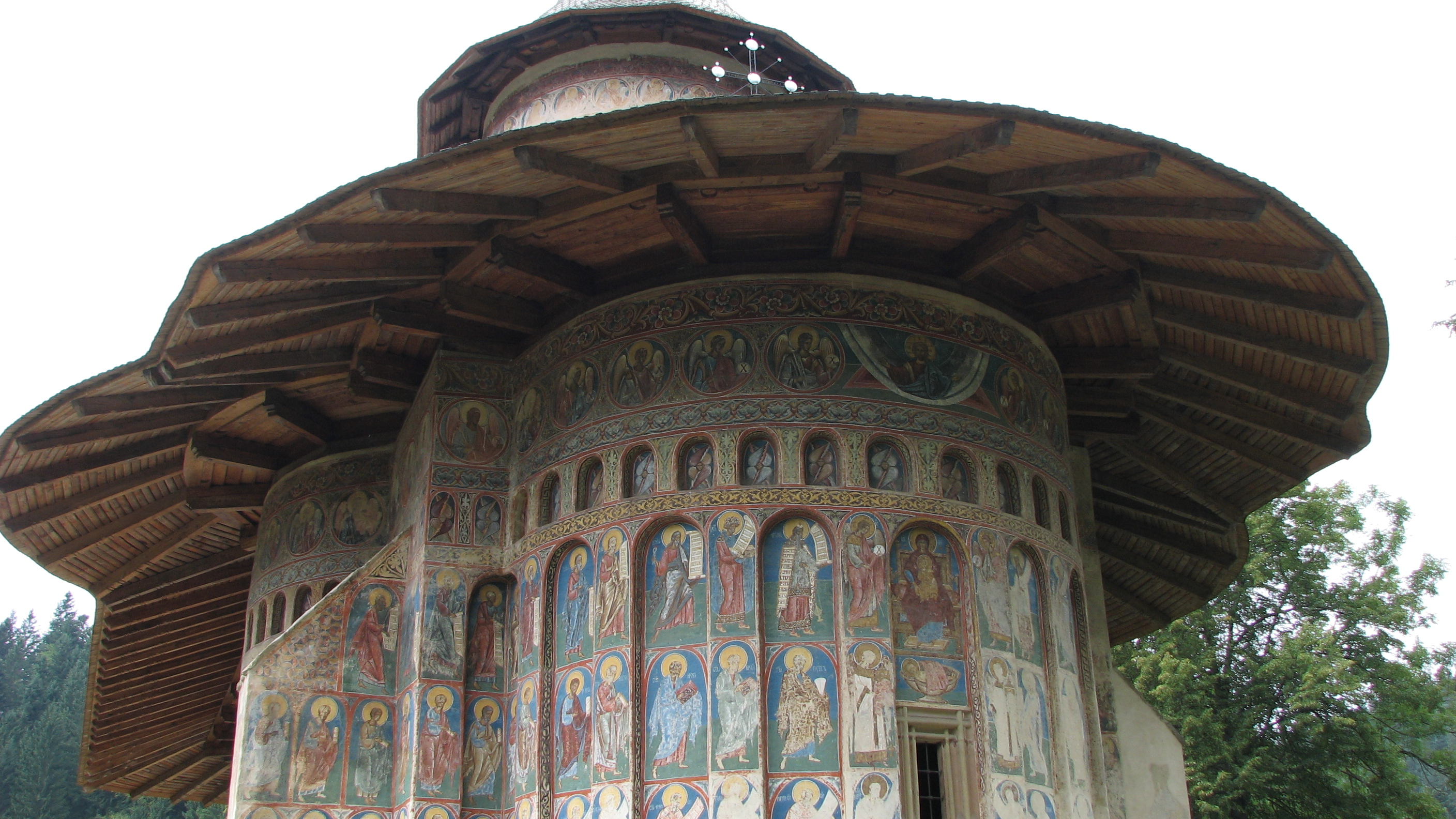 Mănăstirea Voroneţ - Bucovina - România